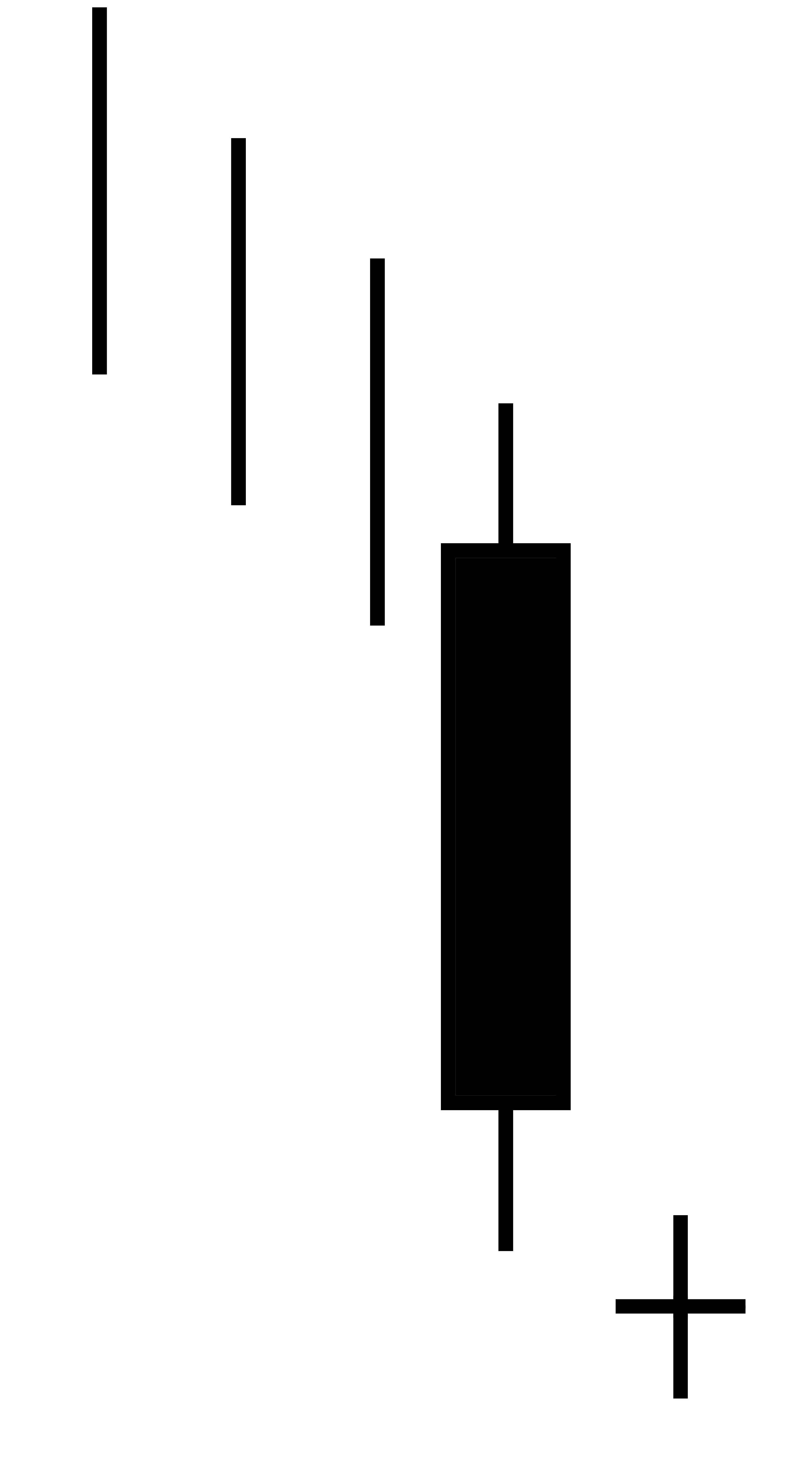 Bullish doji star